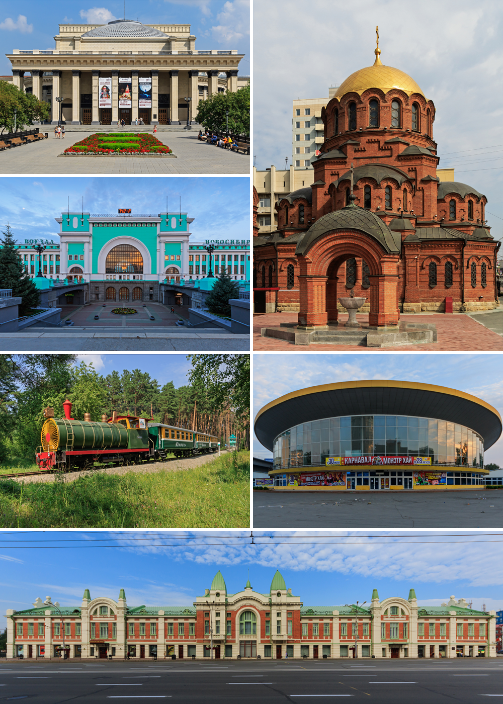 Коллаж для статьи о Новосибирске